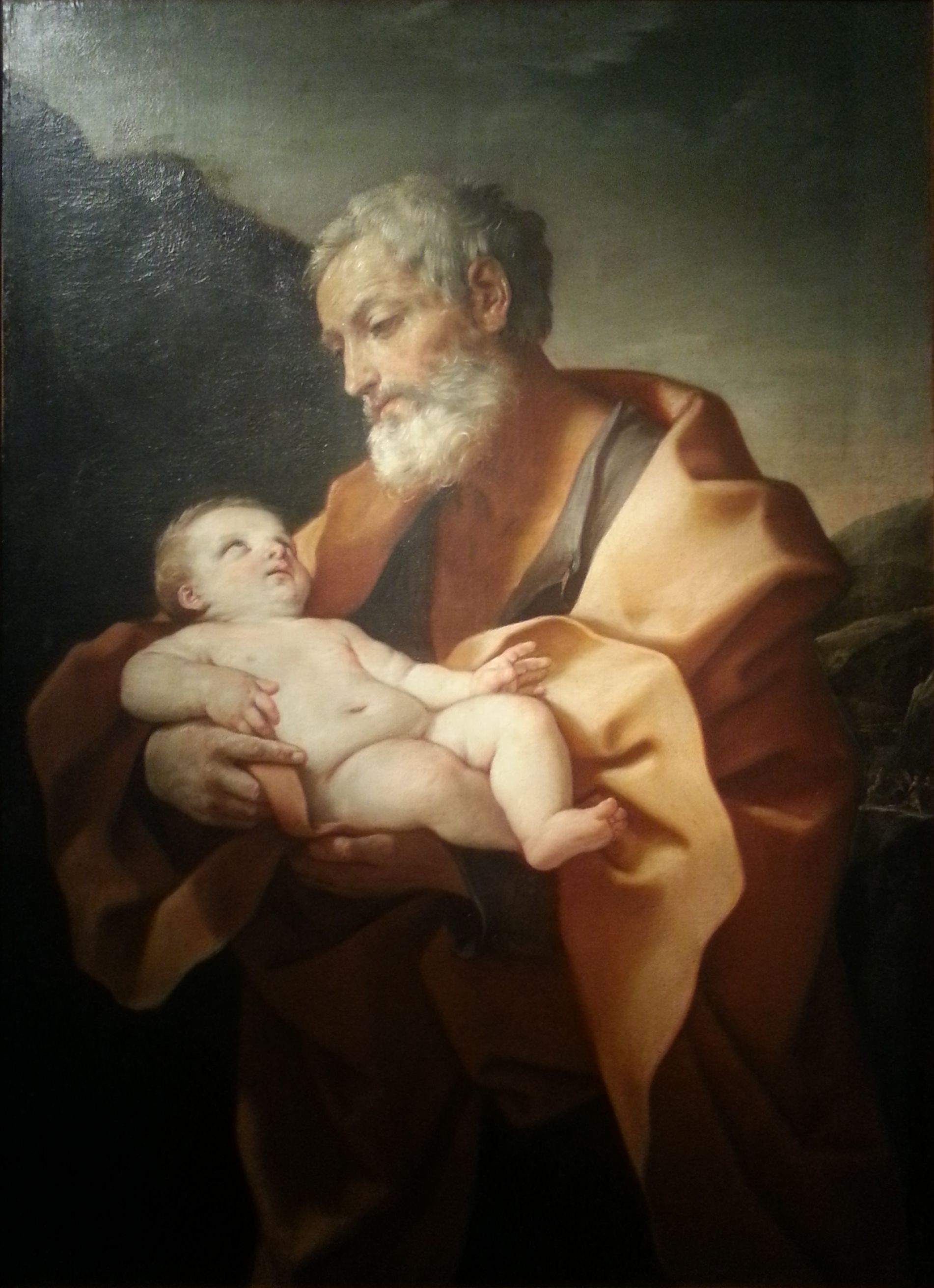 San Giuseppe e il Bambinotitle QS:P1476,it:"San Giuseppe e il Bambino" label QS:Lit,"San Giuseppe e il Bambino"